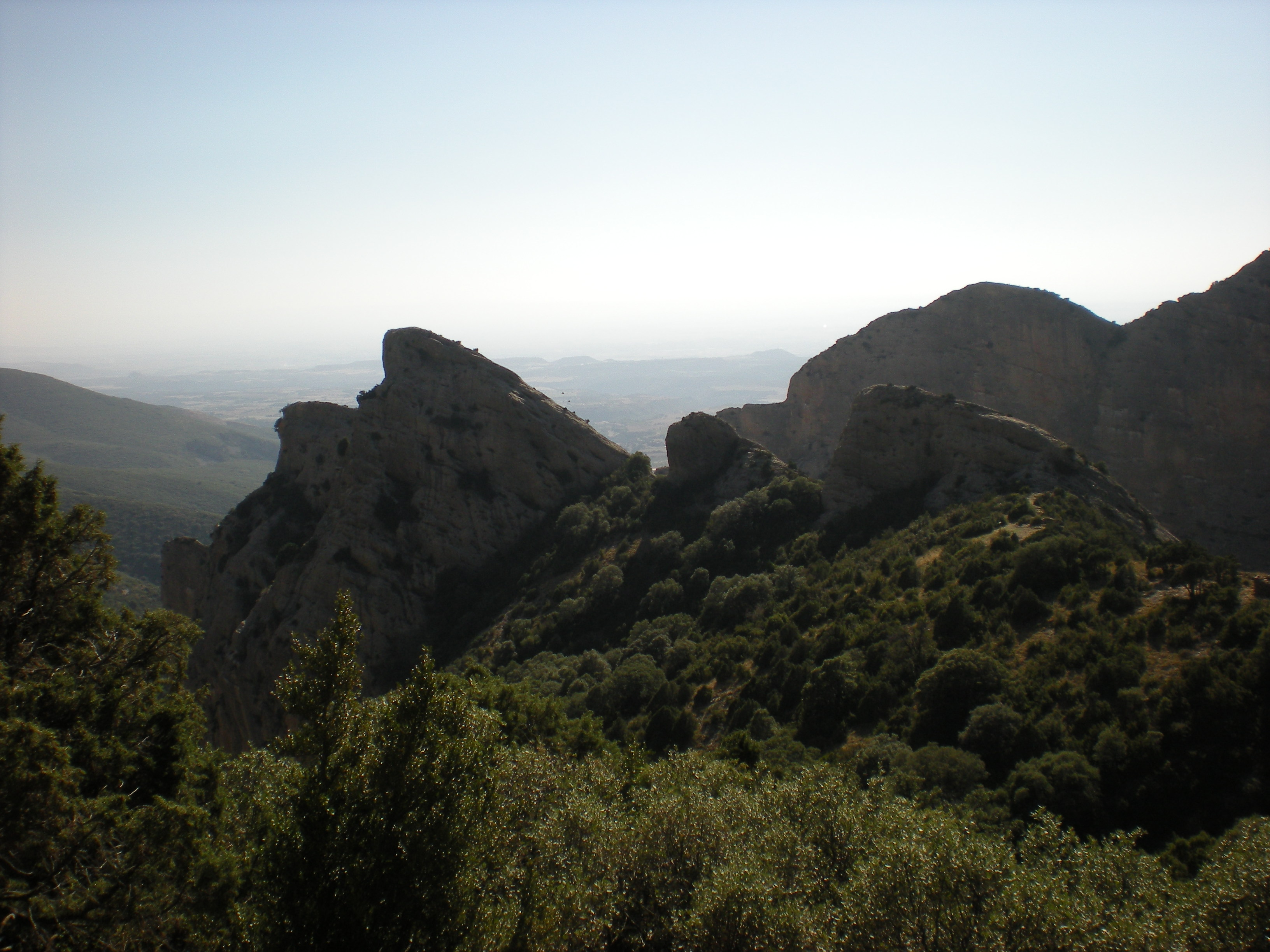 Vista desde el Collado de San Salvador